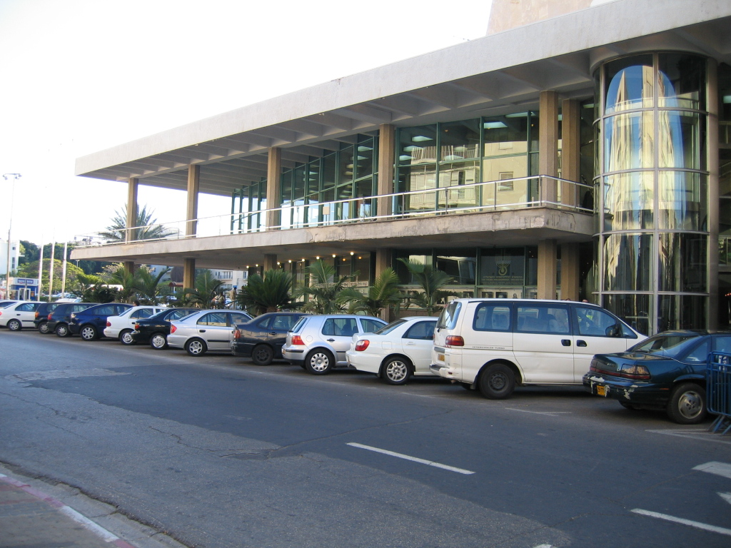 Fredric R. Mann Auditorum in Tel aviv היכל התרבות בתל אביב